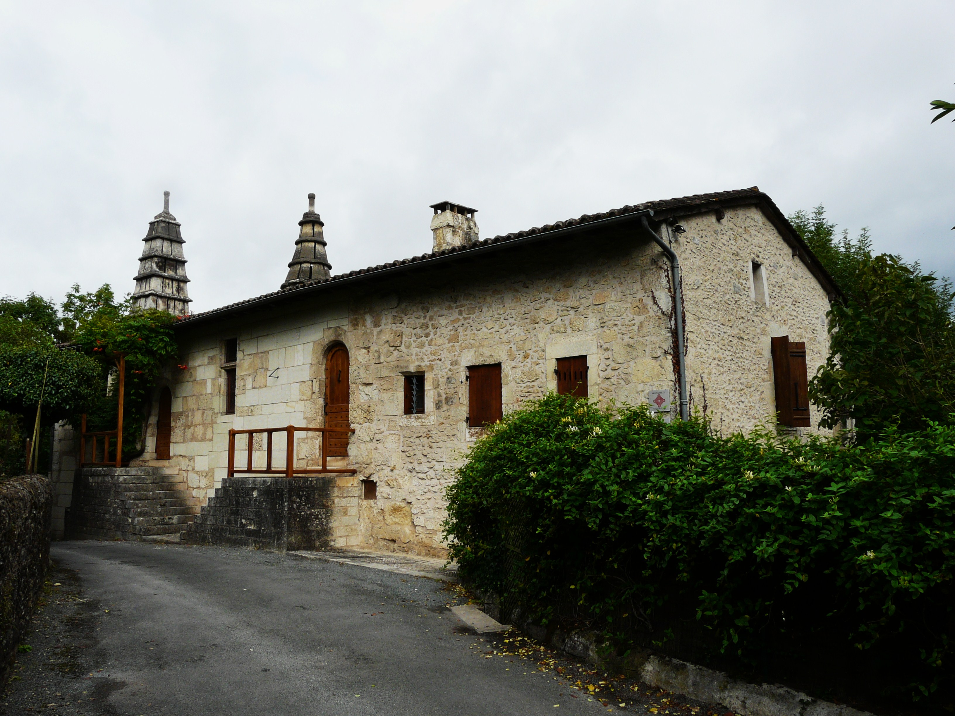 La maladrerie, Coulounieix-Chamiers, Dordogne, France.